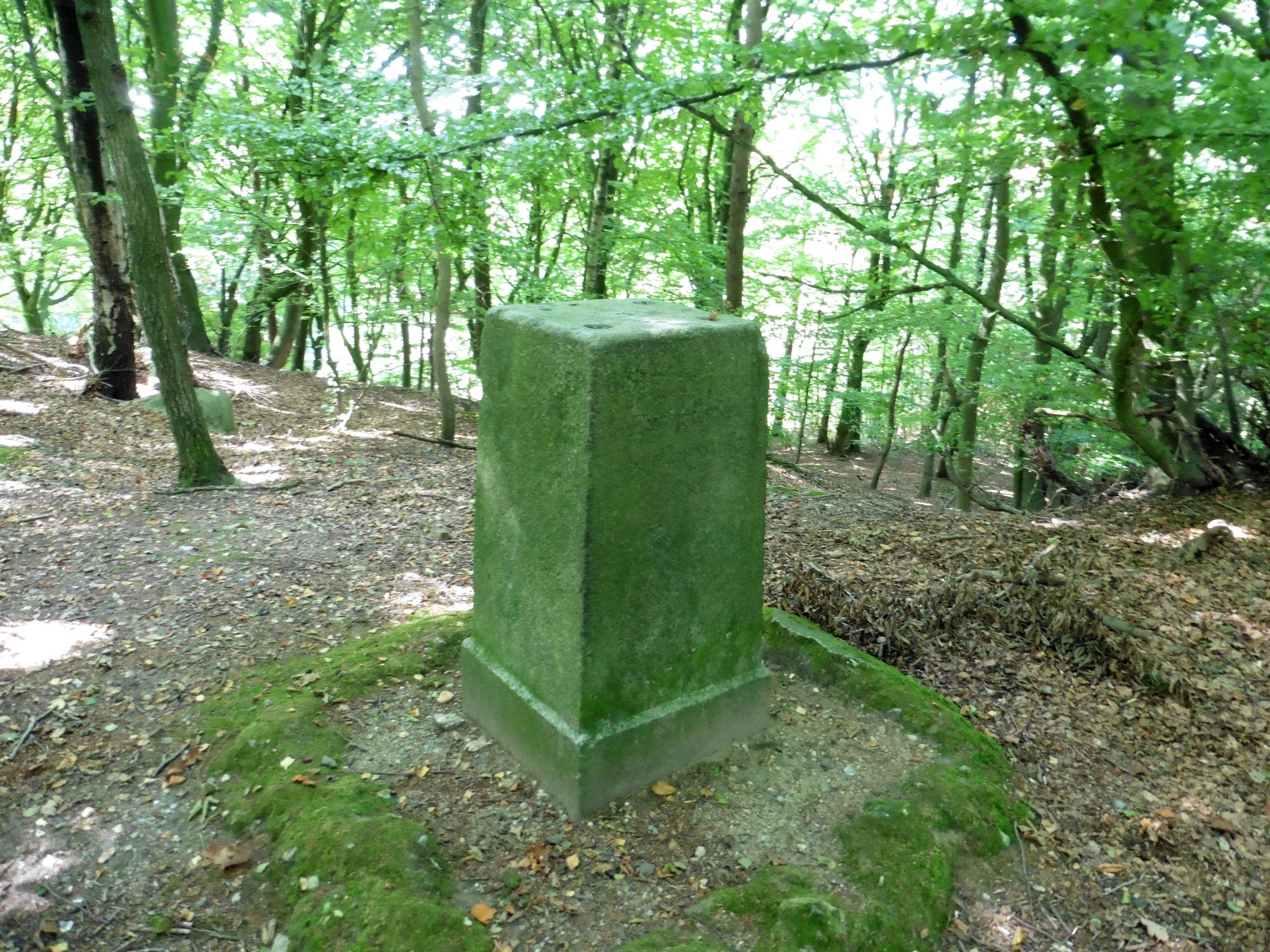 Kiekeberg, TP Vahrendorf 4/2525, Trigonometrischer Punkt I. Ordnung der Europäischen Gradmessung von 1868.